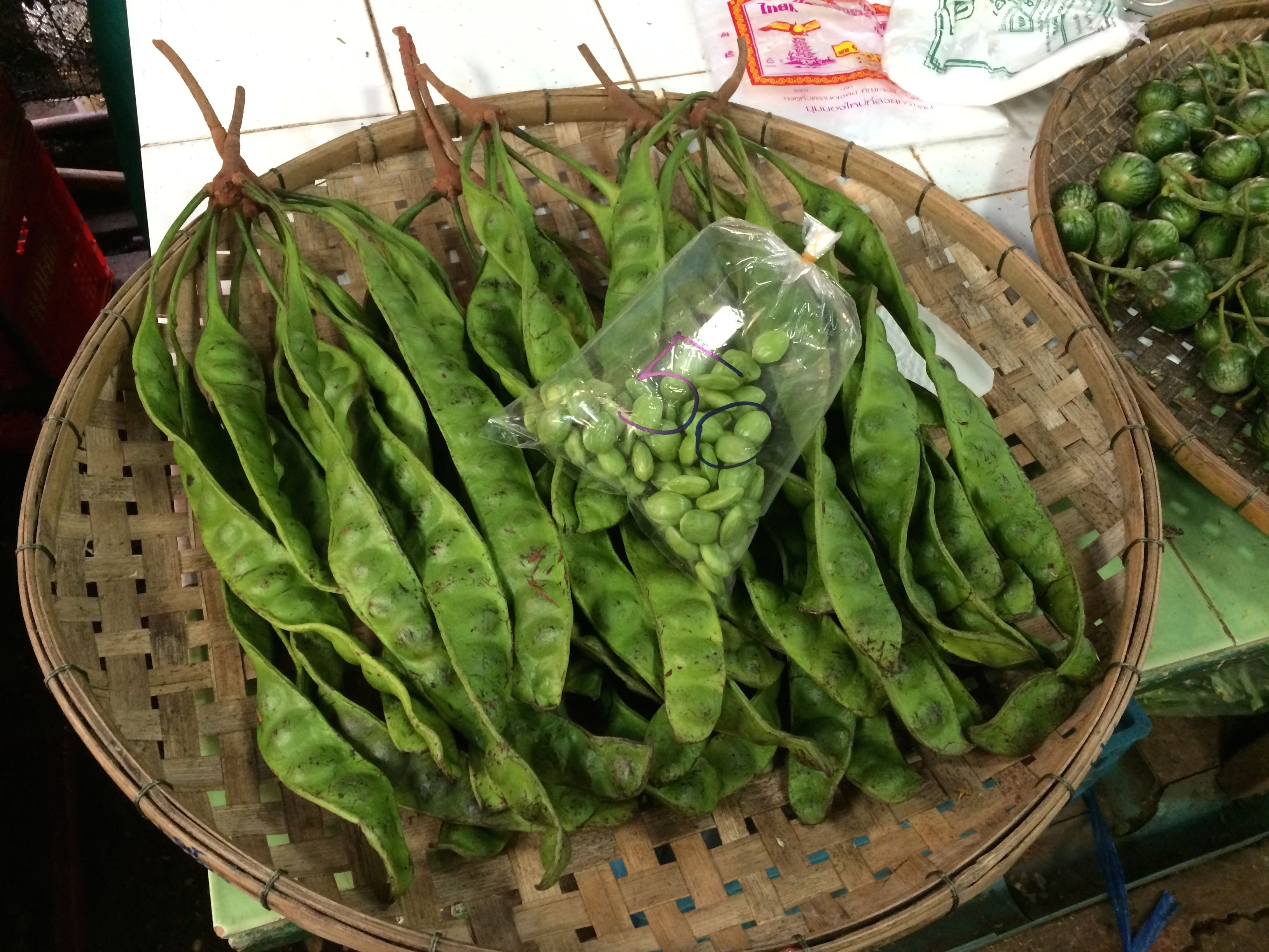 Parkia timoriana haricots et feves Riang เหรียง IMG 0218